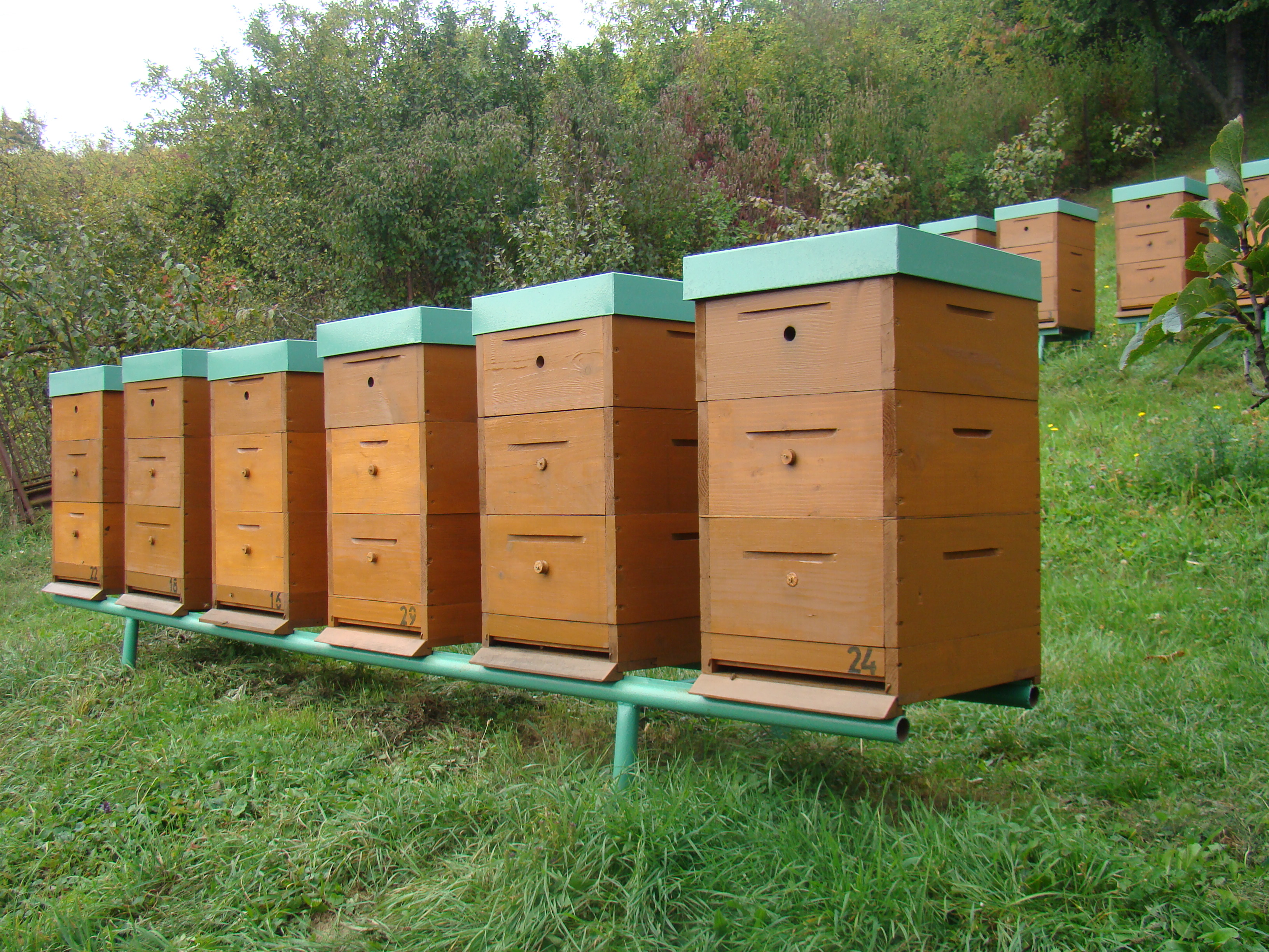 Fotka bola zhotovená u môjho starého otca na záhrade, ktorý sa venuje včeláreniu. Na fotke sú zobrazené úle, v ktorých včelári.